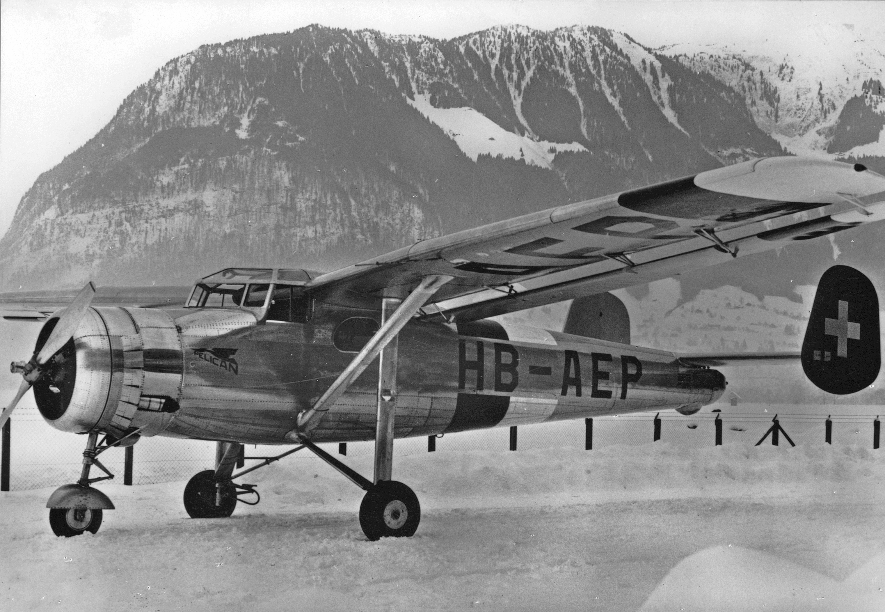 Pilatus SB-2 HB-AEP auf dem Flugplatz Buochs